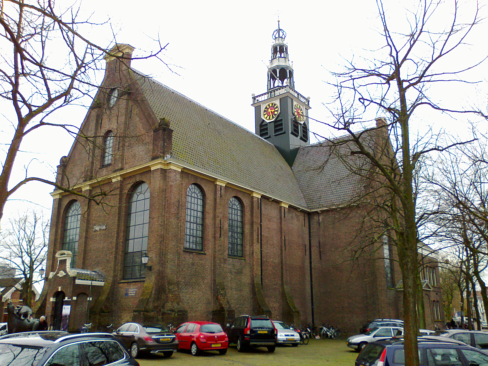 Bullekerk, Westzijde 75, Zaandam